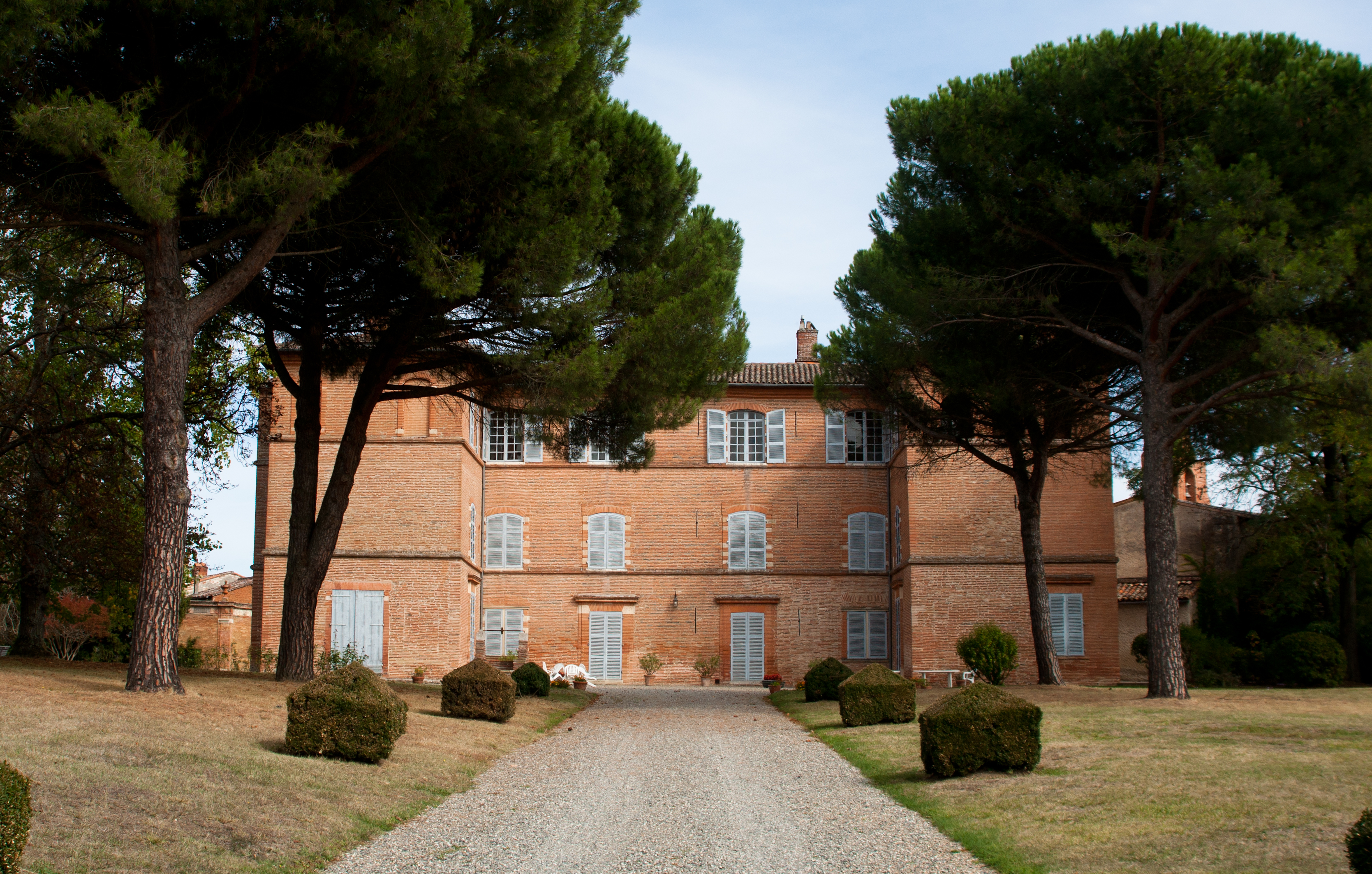 Château de Saint-Geniès-Bellevue (Monuments historiques), Haute-Garonne, France.